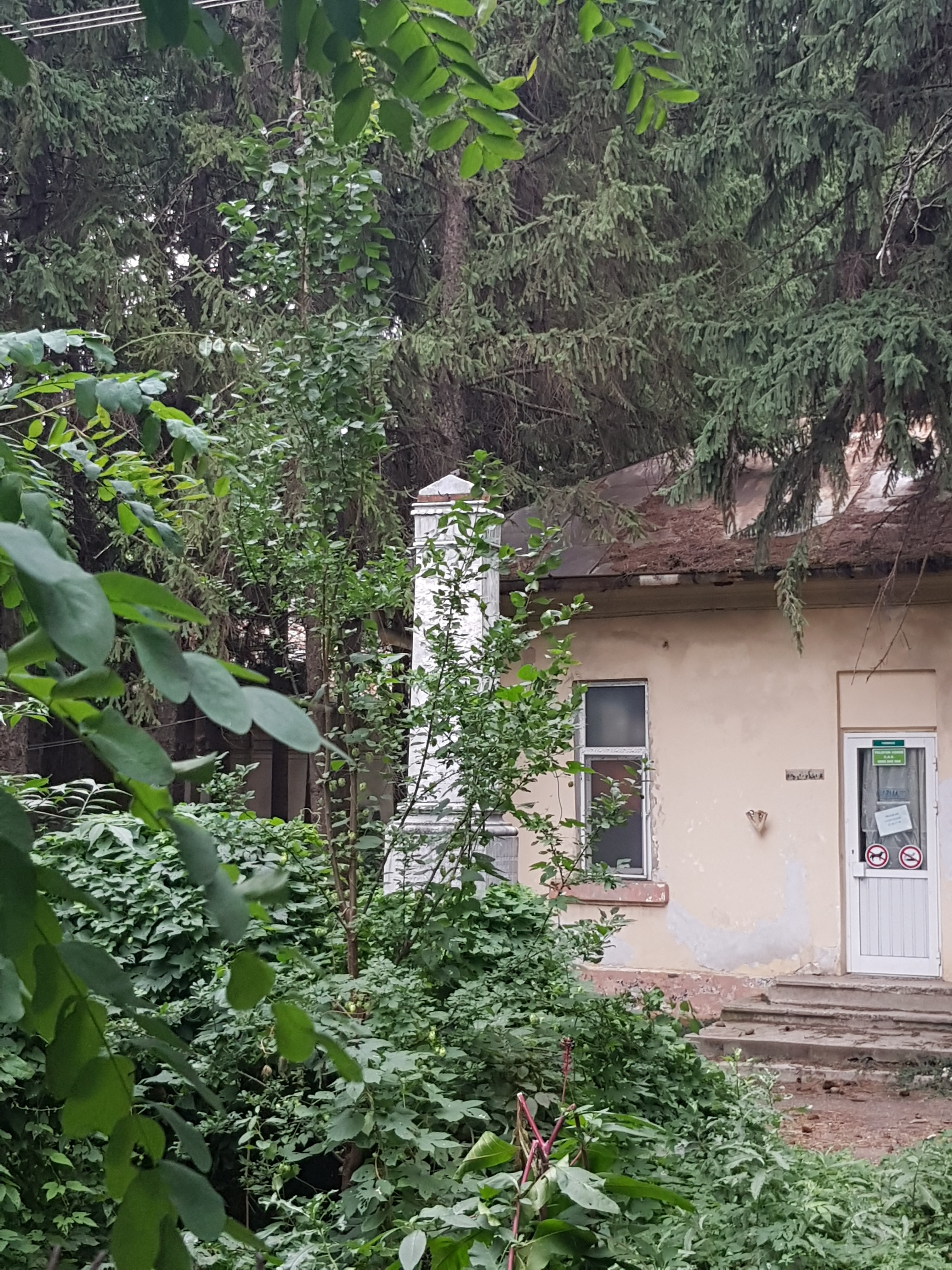 Monumentul Eroilor Regimentului 10 Putna căzuți în 1913